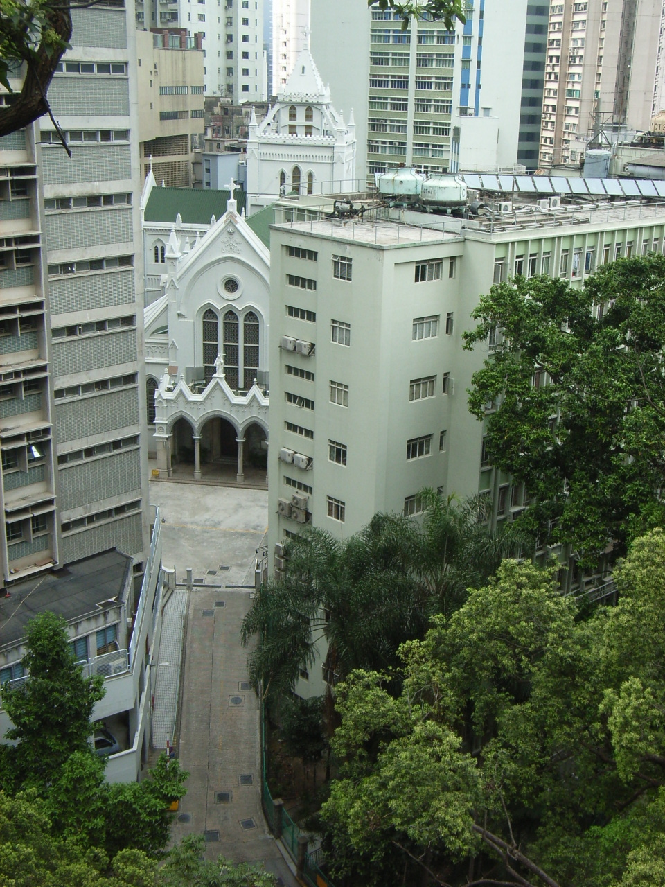 聖母無原罪主教座堂是天主教香港教區的主教座堂，位於香港中環zh:堅道，於1888年落成。